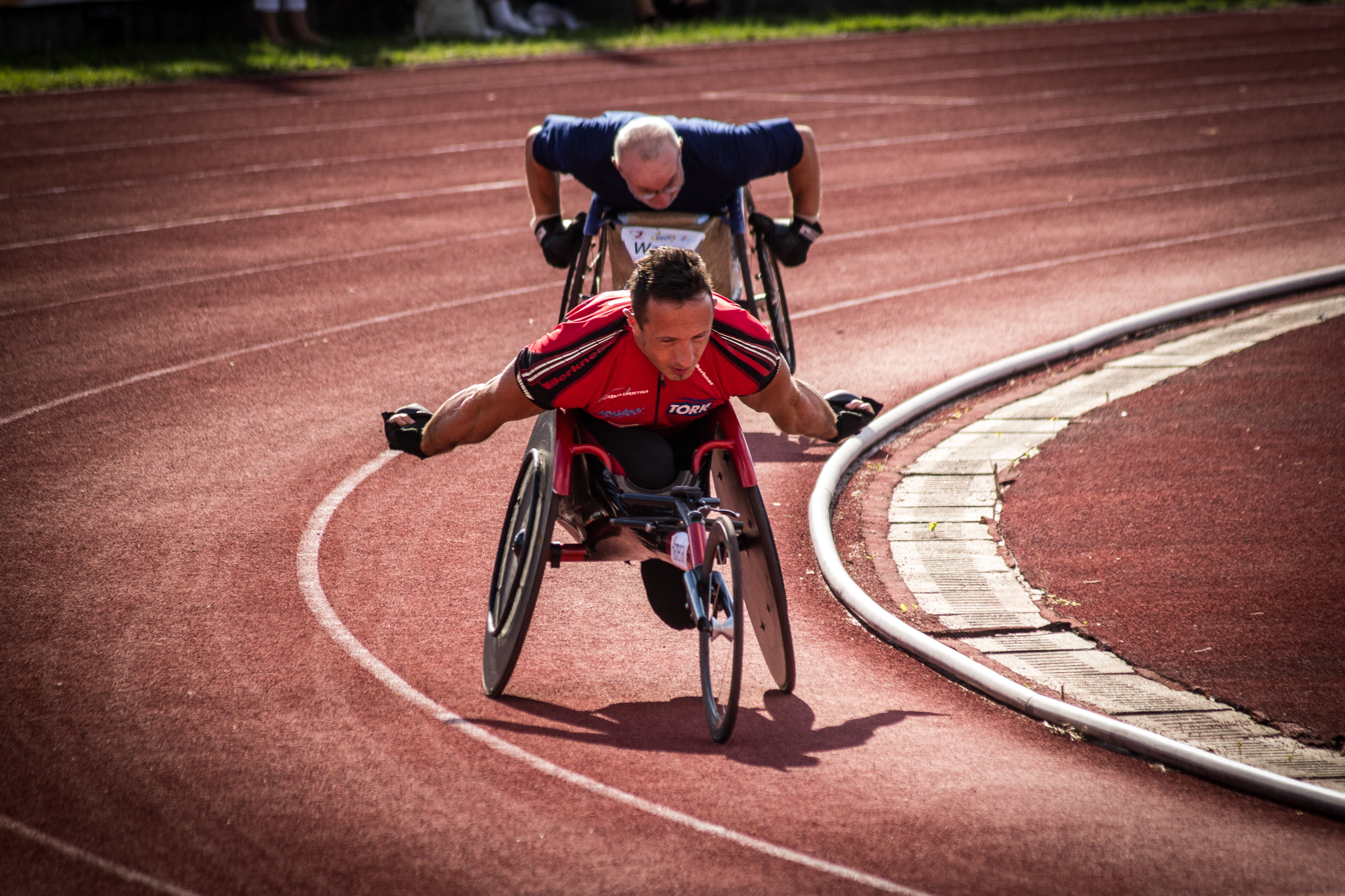 Memoriał Kamili Skolimowskiej w Warszawie, 2013-08-25